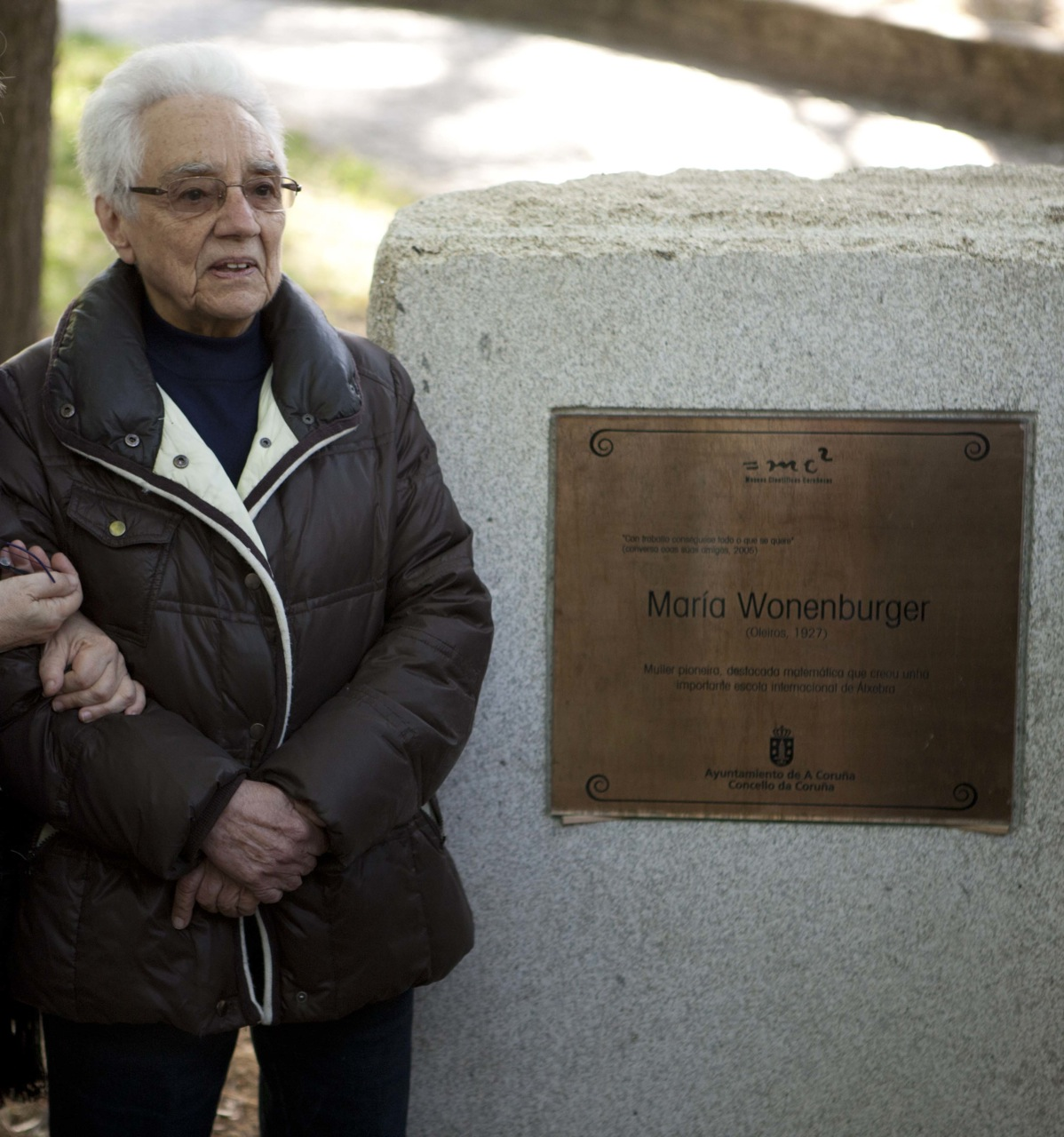 María Wonenburger, matemática